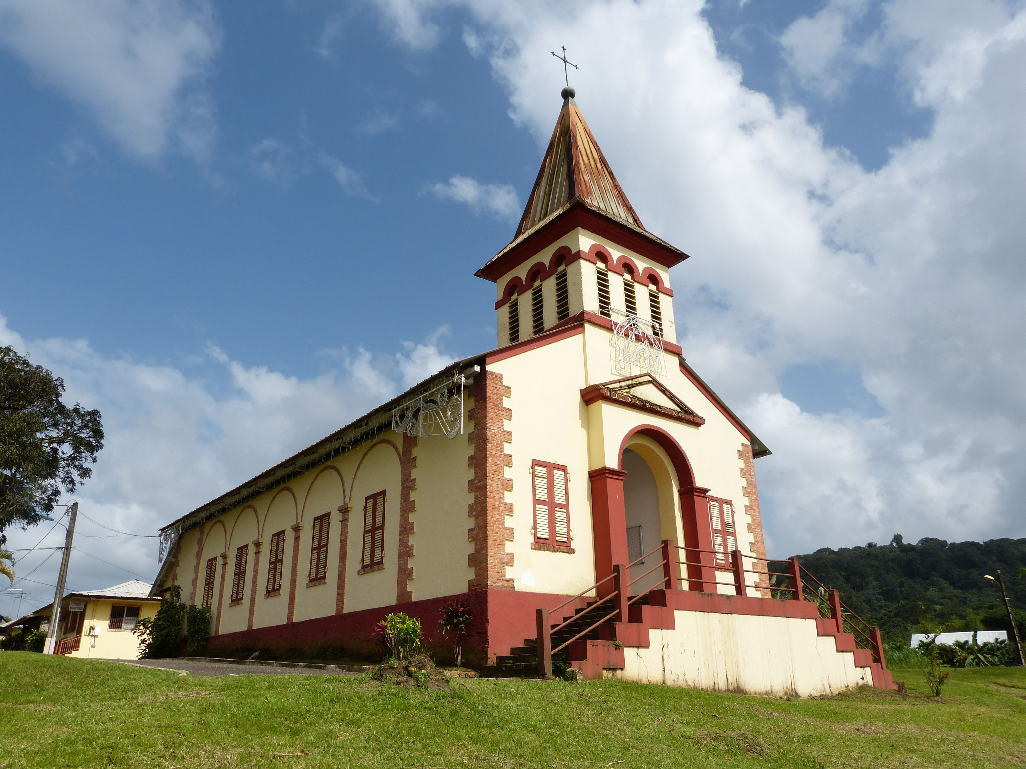 Eglise Catholique de Roura (Guyane)